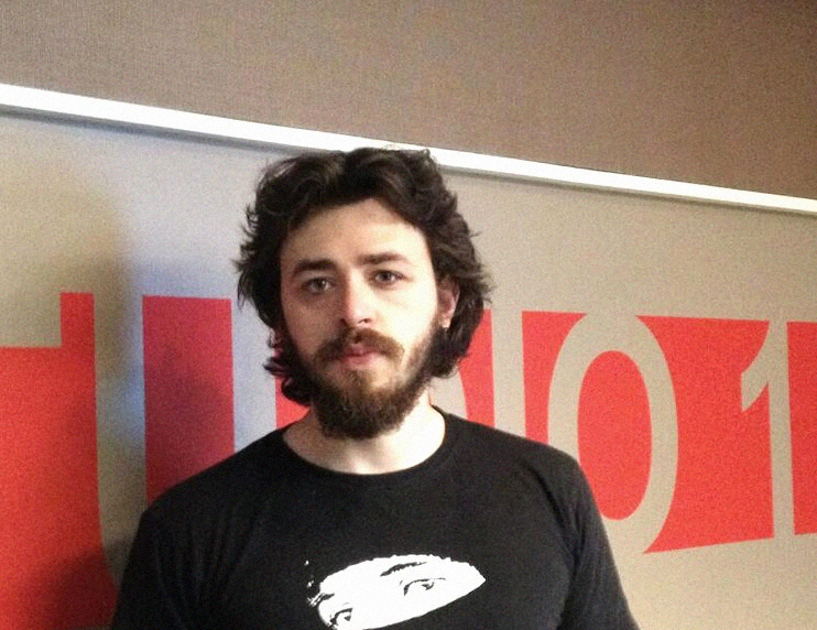 Portrait de M. Le Roy, scénariste et dessinateur